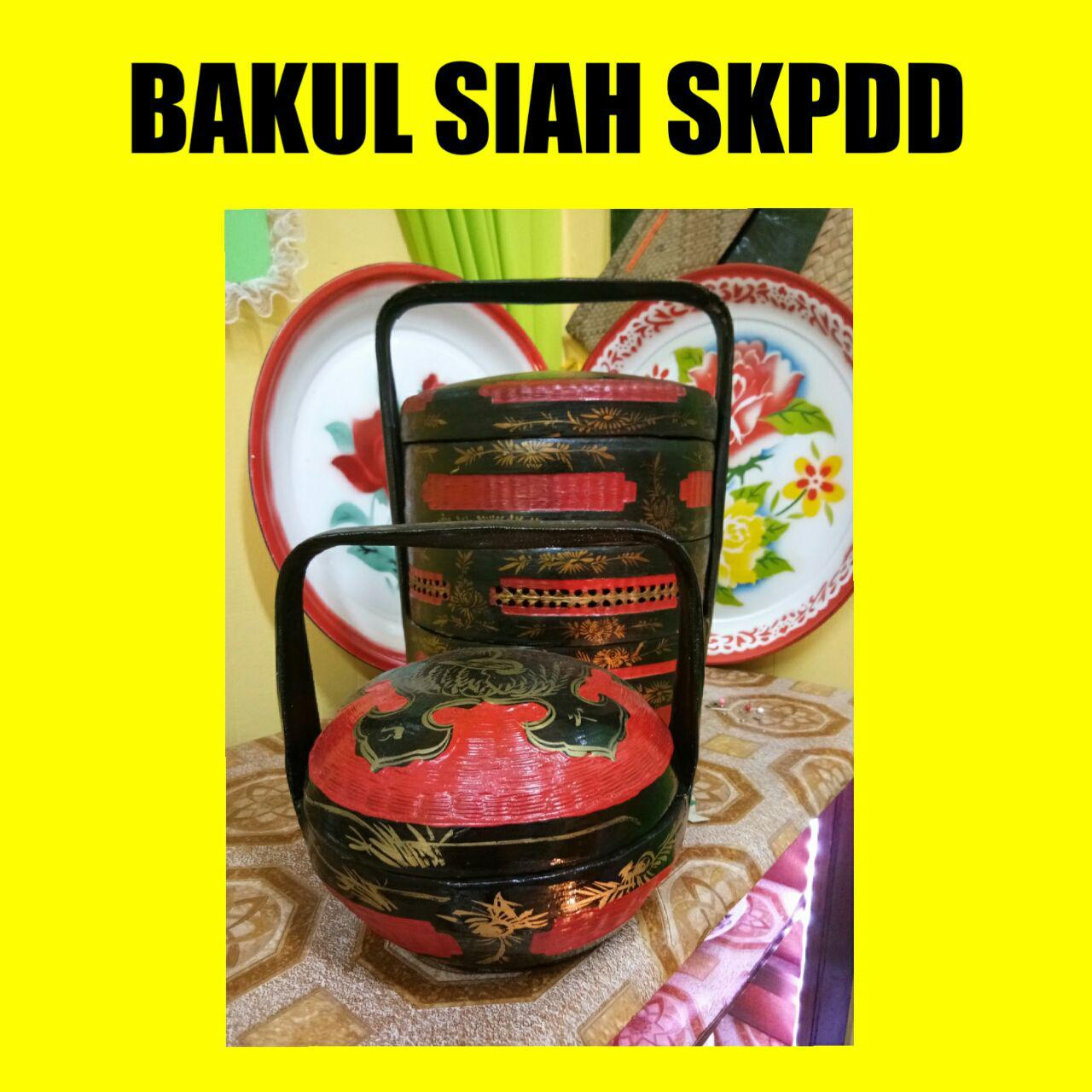 Bakul Siah